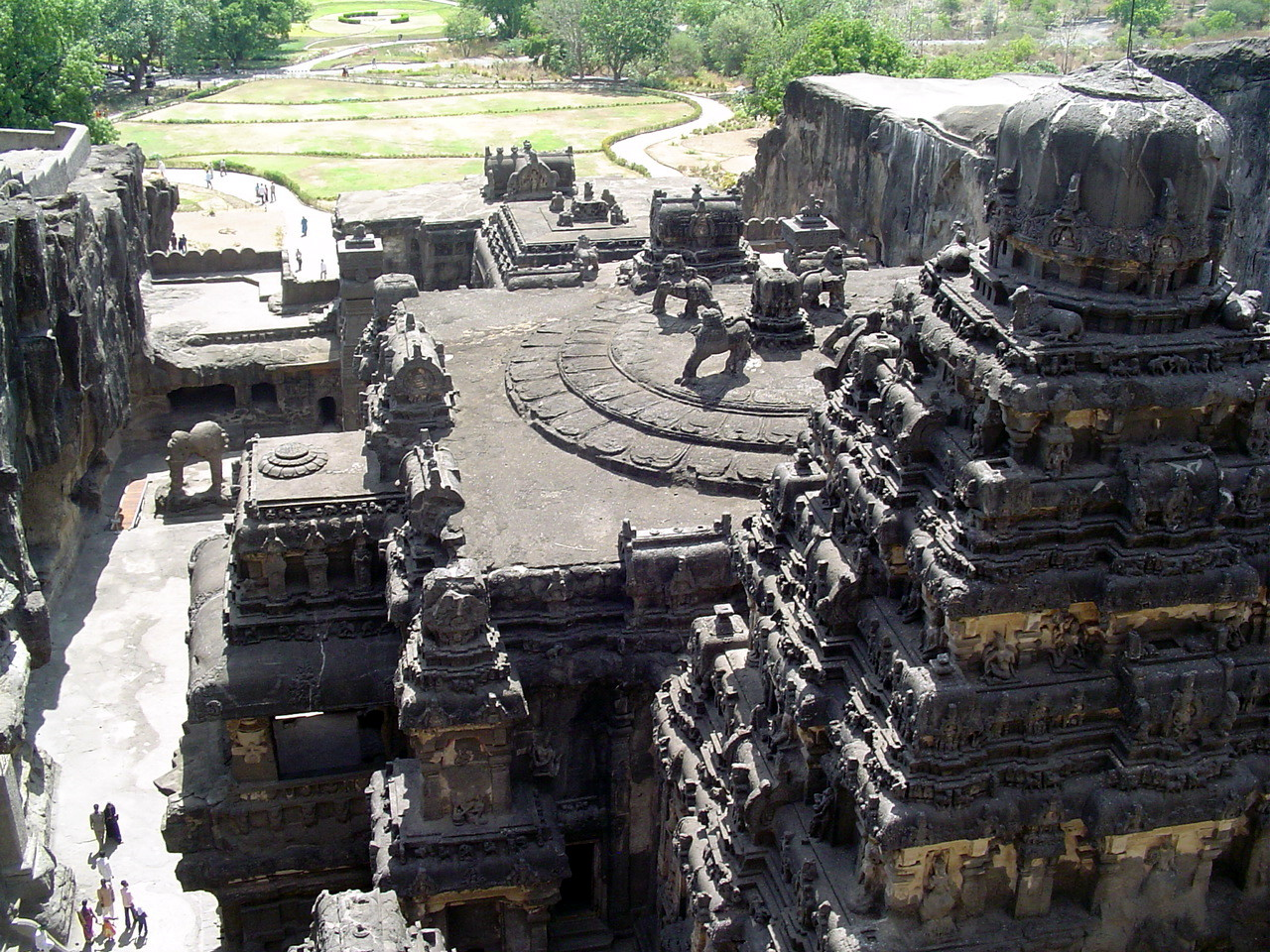 Imagen lateral del templo de Kailash, situado en Ellora (Maharastra, India), y dedicado al dios Shiva. Es famoso por haber sido esculpido en una única formación rocosa.